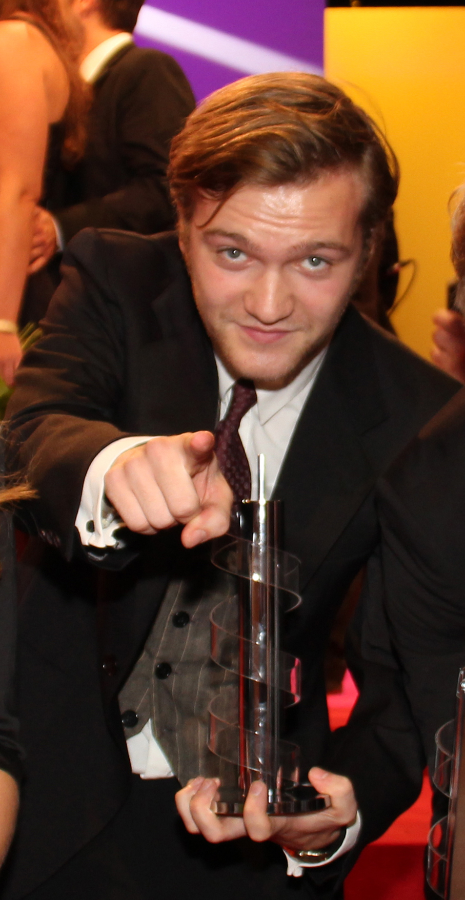 Preisträger des Films Mittlere Reife beim Hessischen Film- und Kinopreis 2012: Isabel Bongard, Sonja Gerhardt, Vincent Redetzki, Anton Rubtsov und Jannik Schümann